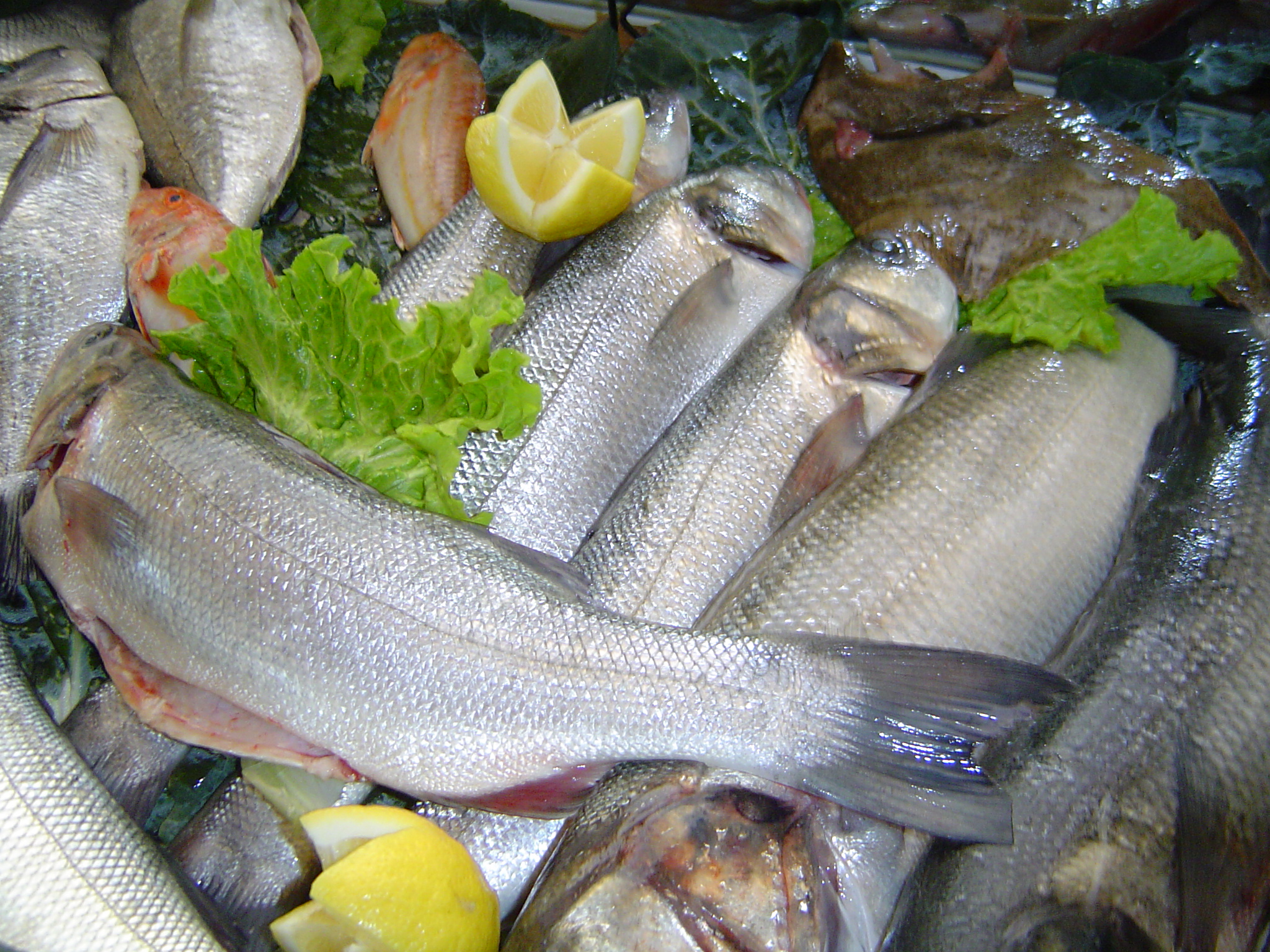 Fësch.